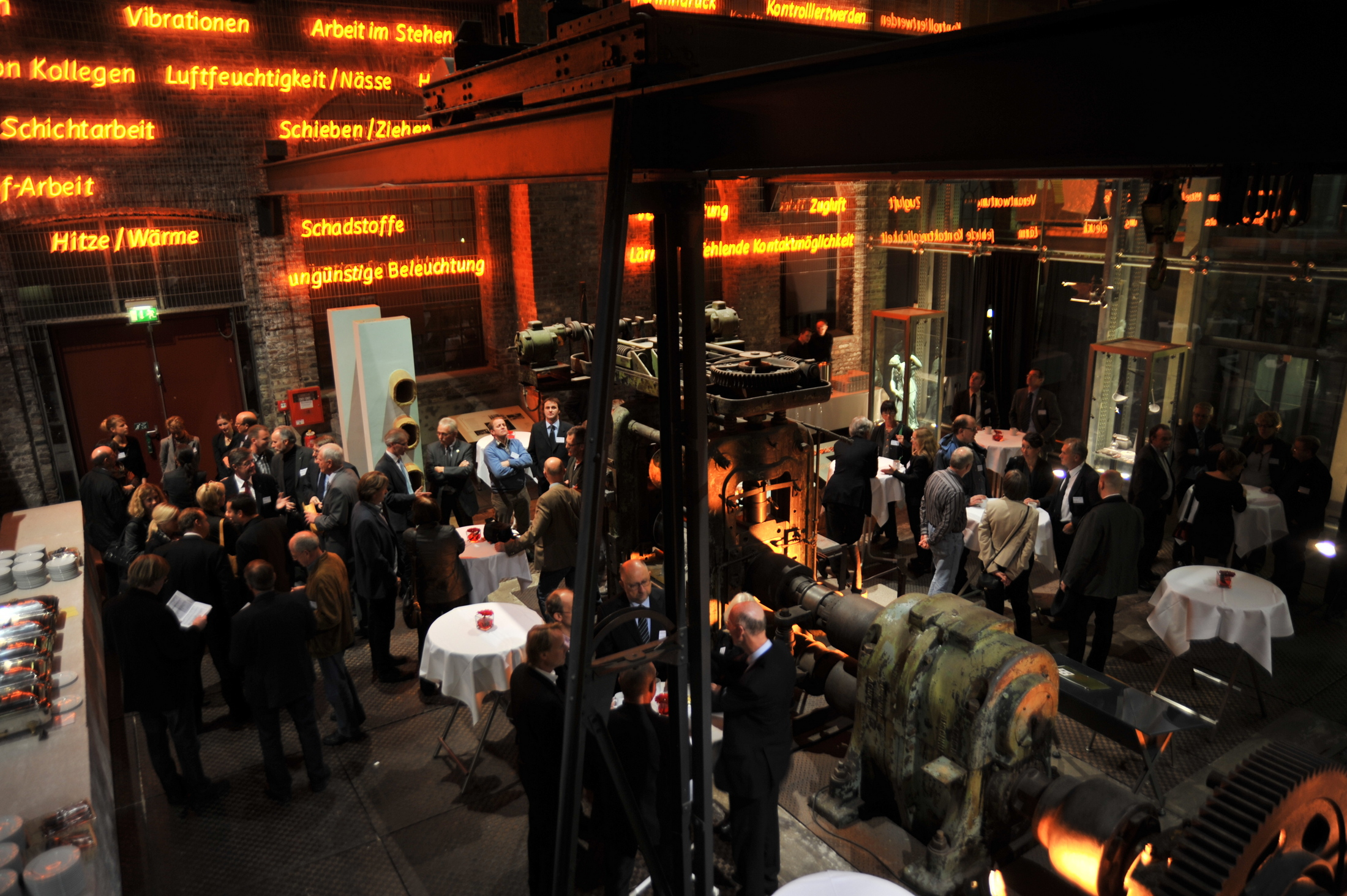 European Energy Award 2012 EEA 2012 Flickr tags: LVR-Industriemuseum; Oberhausen; Verleihung; European Energy Award; EnergieAgentur.NRW; Kommunen; Landkreise; Klimaschutz; Johannes Remmel